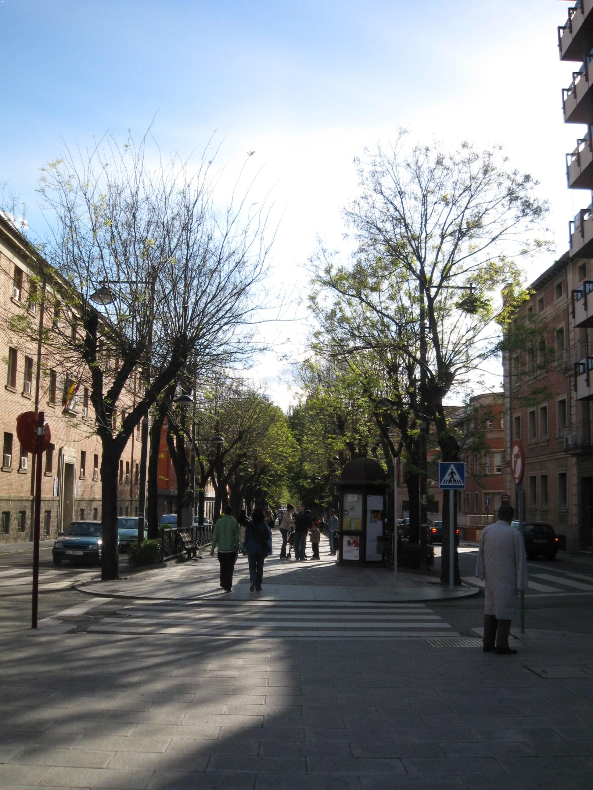 Paseo del Doctor Fernández Iparraguirre in Guadalajara, Spain